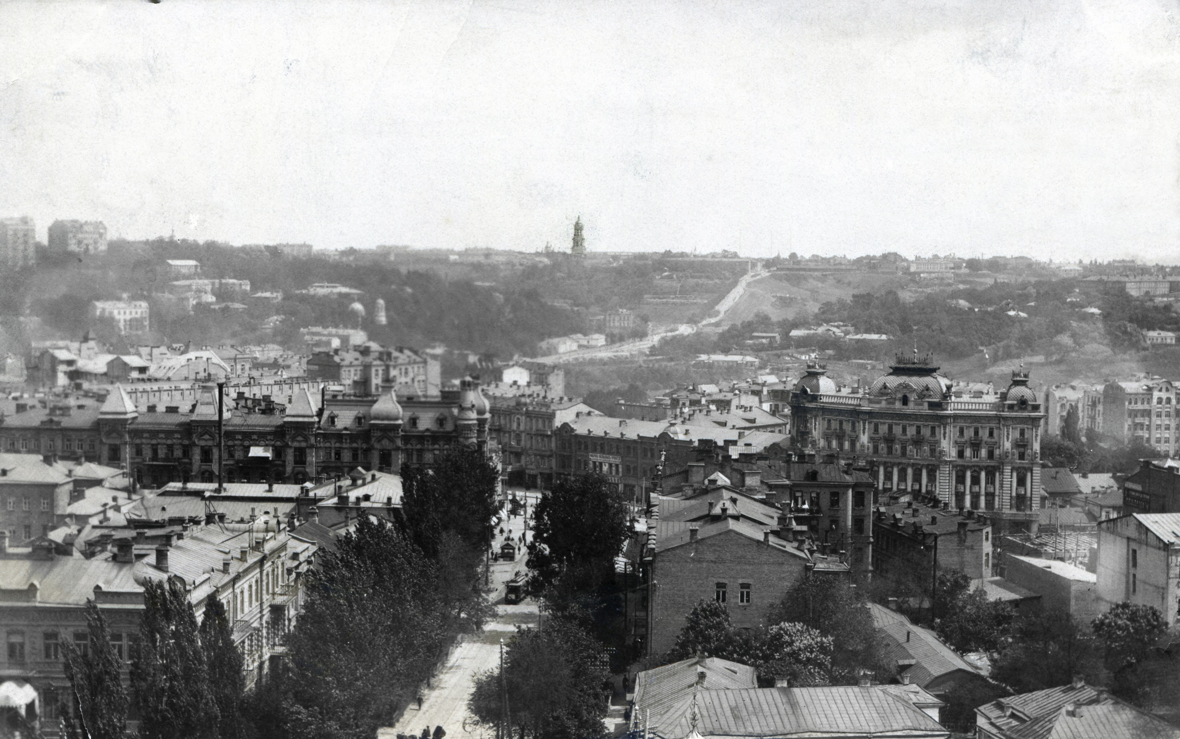 Місцевість Нова Забудова. На передньому плані вулиця Толстого, перпендикулярно їй - Велика Васильківська вулиця, справа - Будинок Бендерського, на задньому плані - бульвар Лесі Українки. Київ .